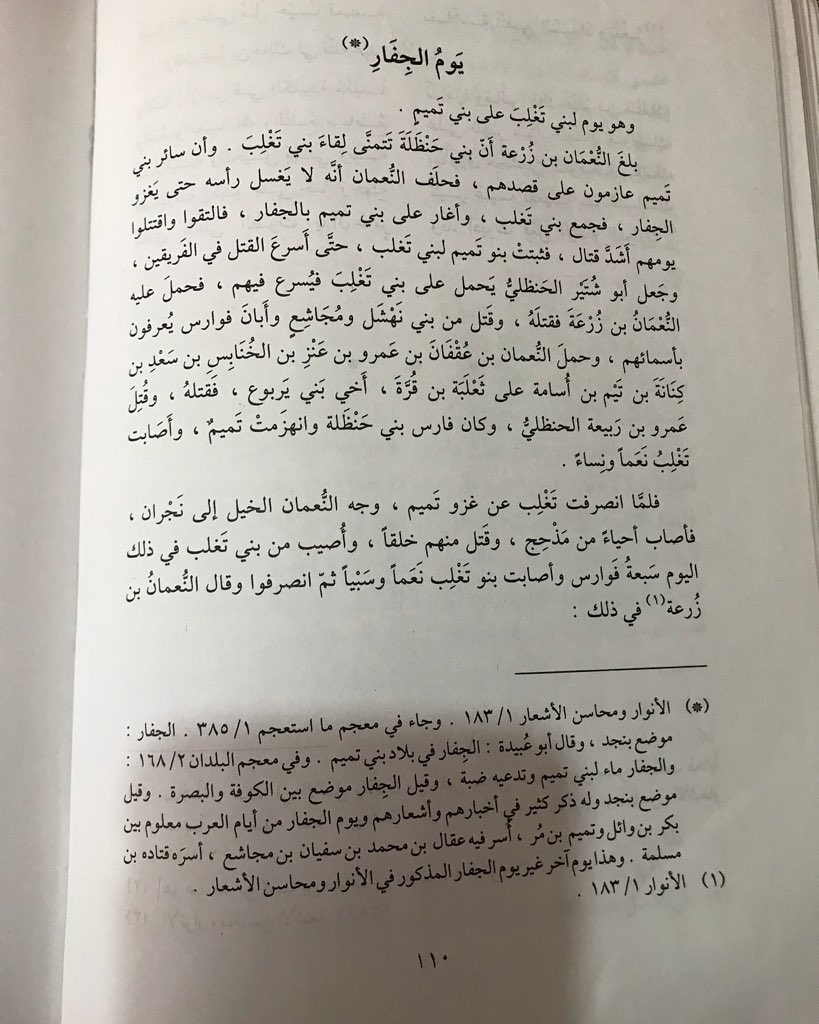 حرب تميم وتغلب بن وائل